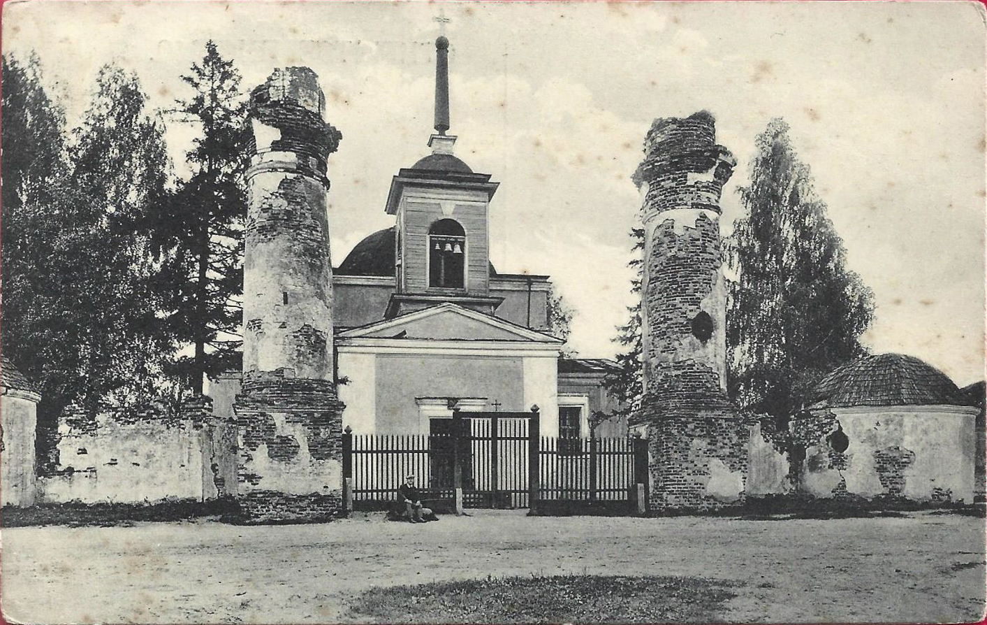 Беларуская (тарашкевіца): Полацак (Połacak), Струньне (Struńnie). Рэзыдэнцыя полацкіх мітрапалітаў, царква Ўзвышэньня Сьвятога Крыжа